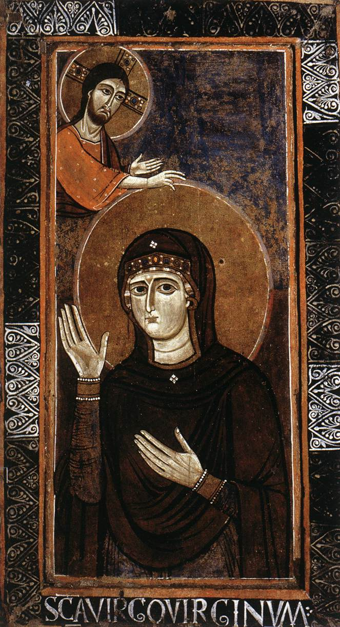 (Haghiosoritissa)